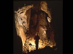 Grotte dans le territoire du "Cansiglio" en Italie du nord.